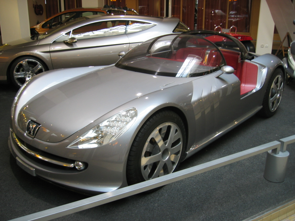 Peugeot 607 Féline Prototype - V6